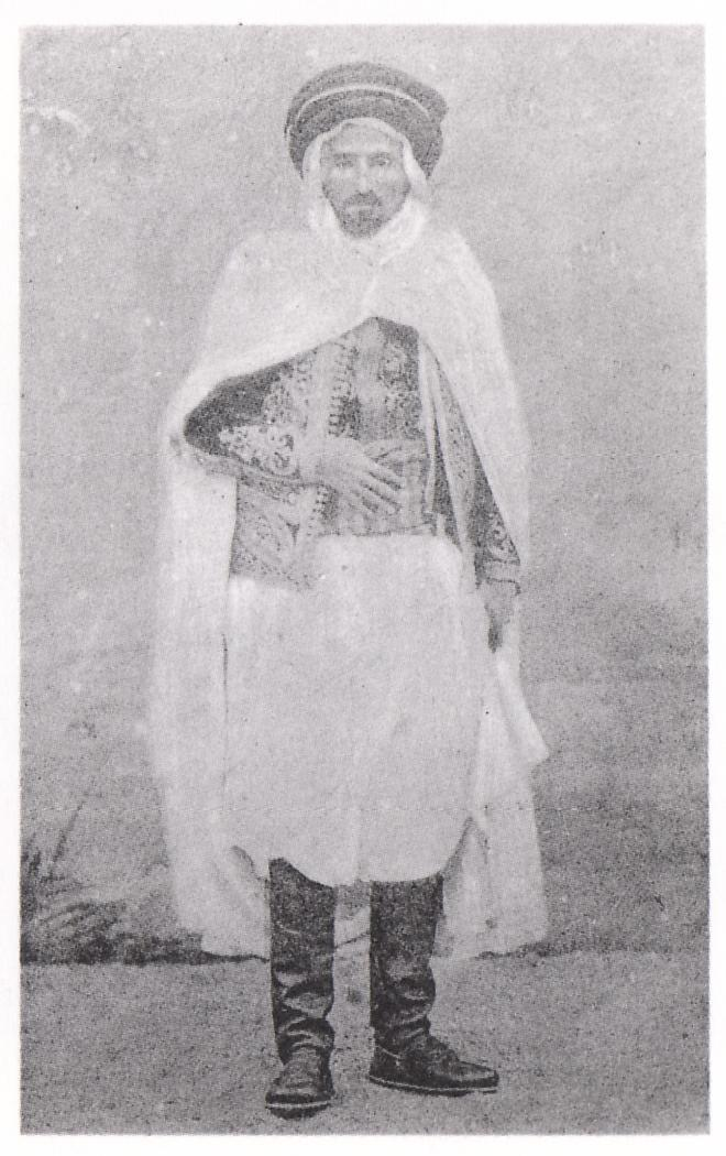 Bou Mezrag El Mokrani